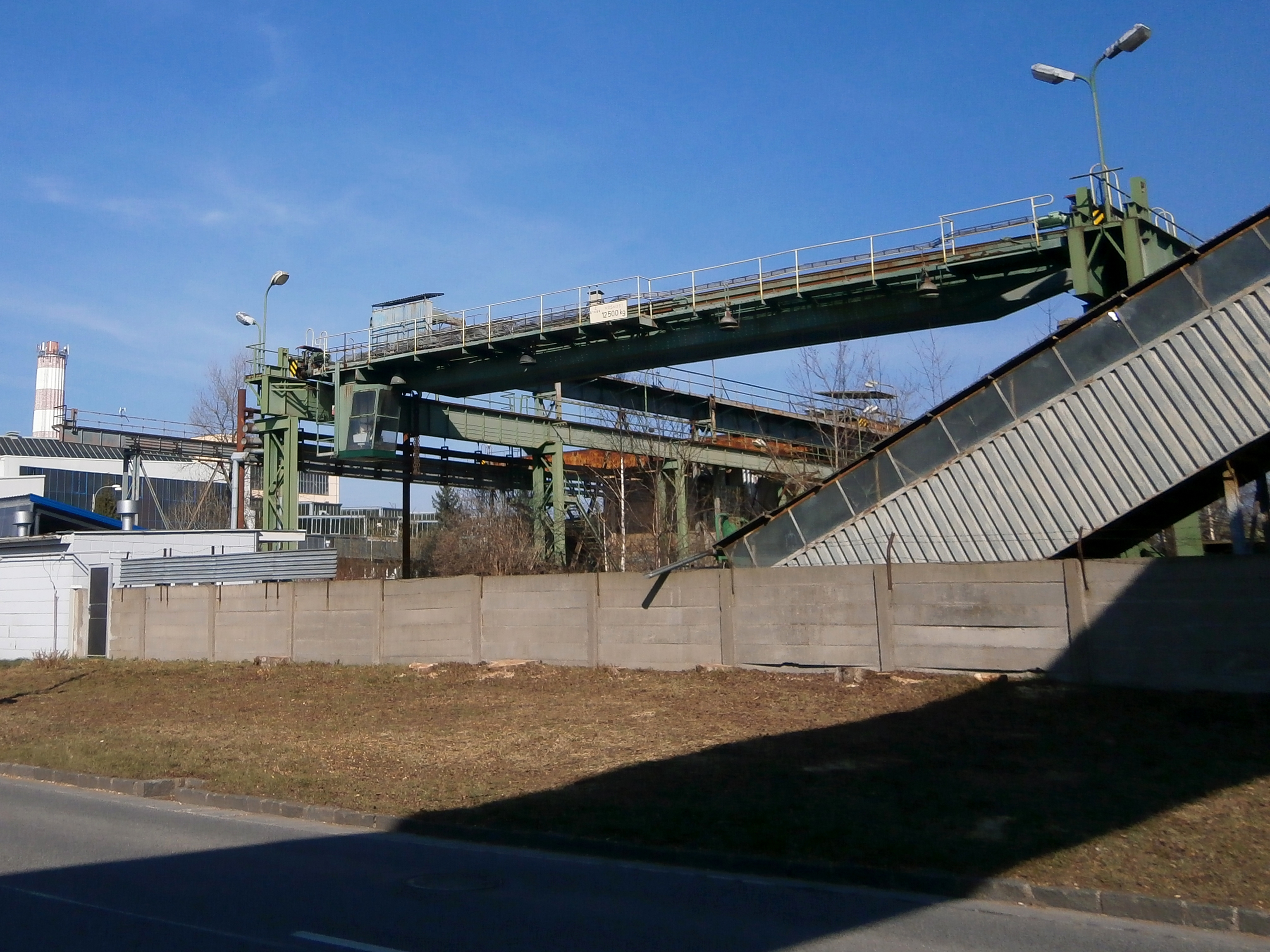 Areál ZVU, bývalých Závodů Vítězného února